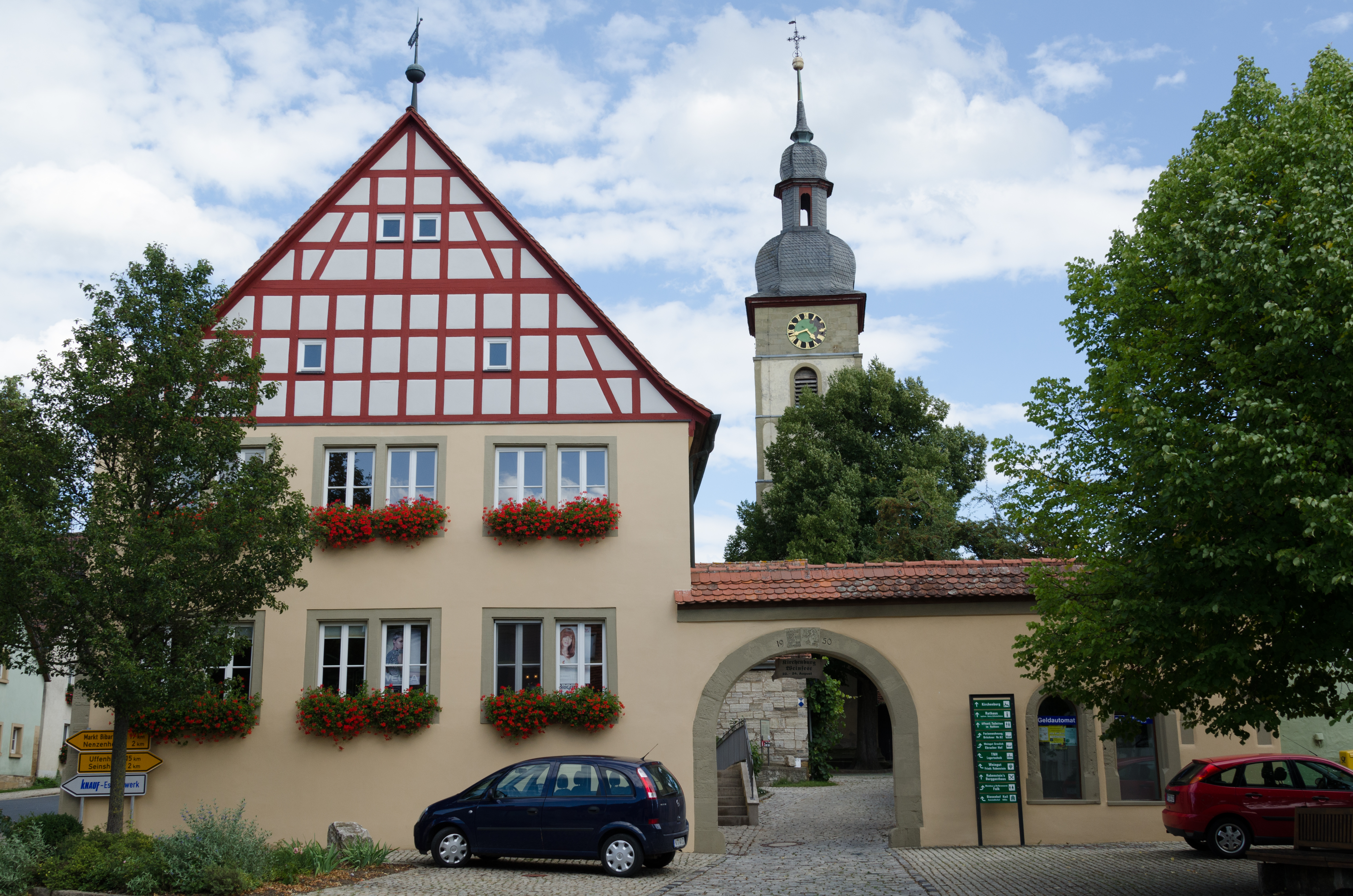 Willanzheim, Hüttenheim 1